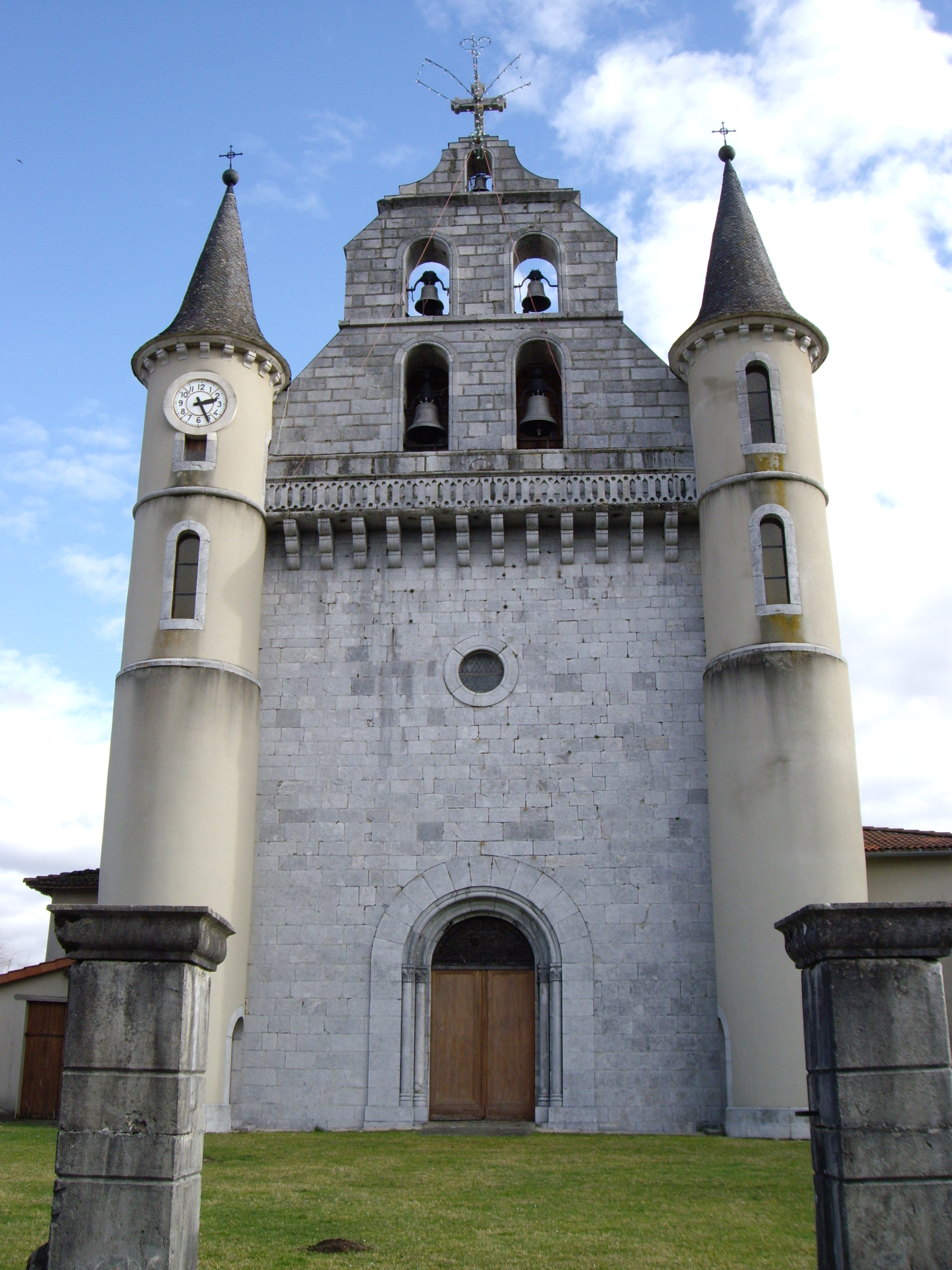 Église de Prat (Prat-Bonrepaux, Ariège, France).